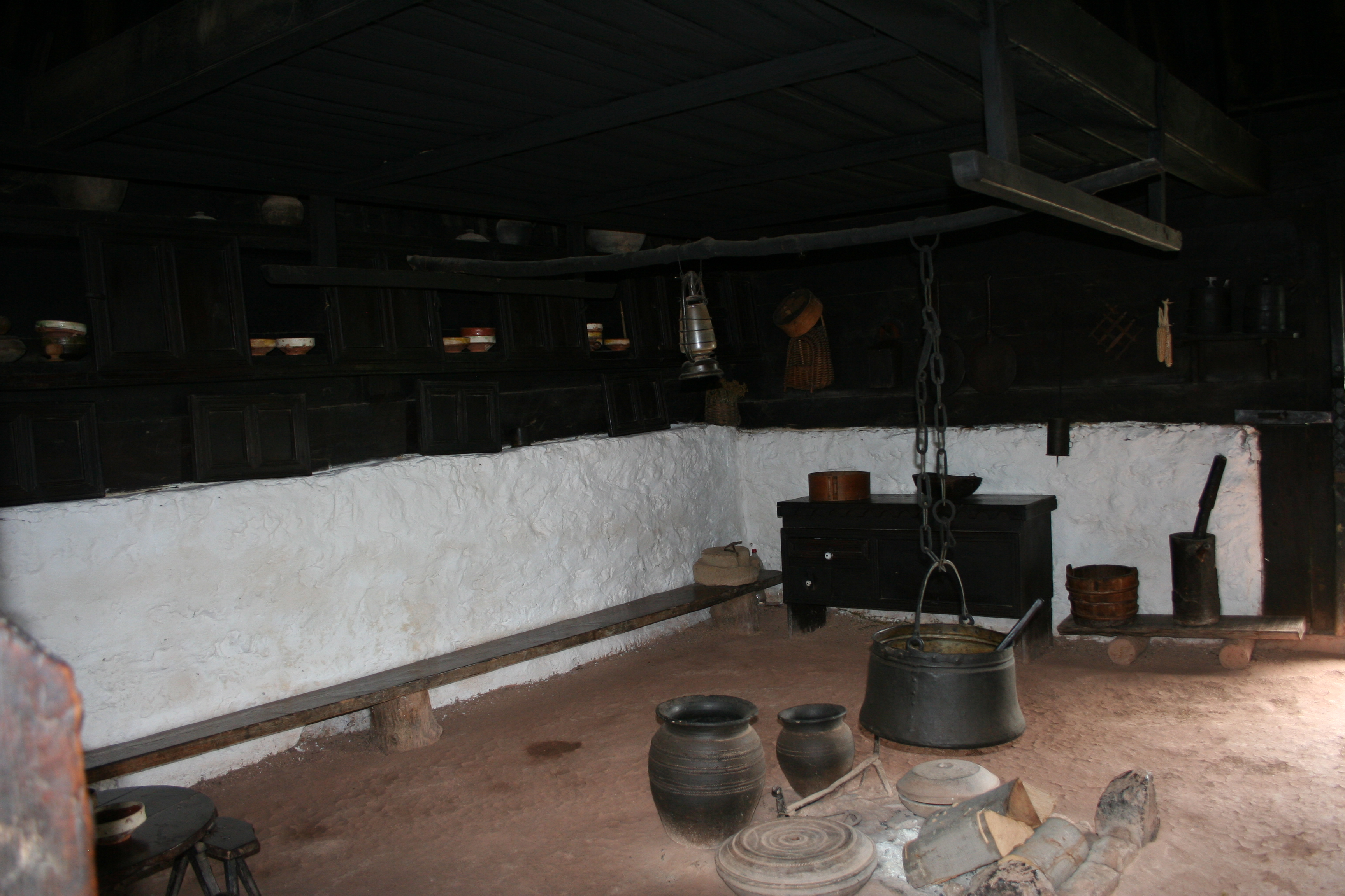 Muzej na otvorenom "Staro selo" Sirogojno